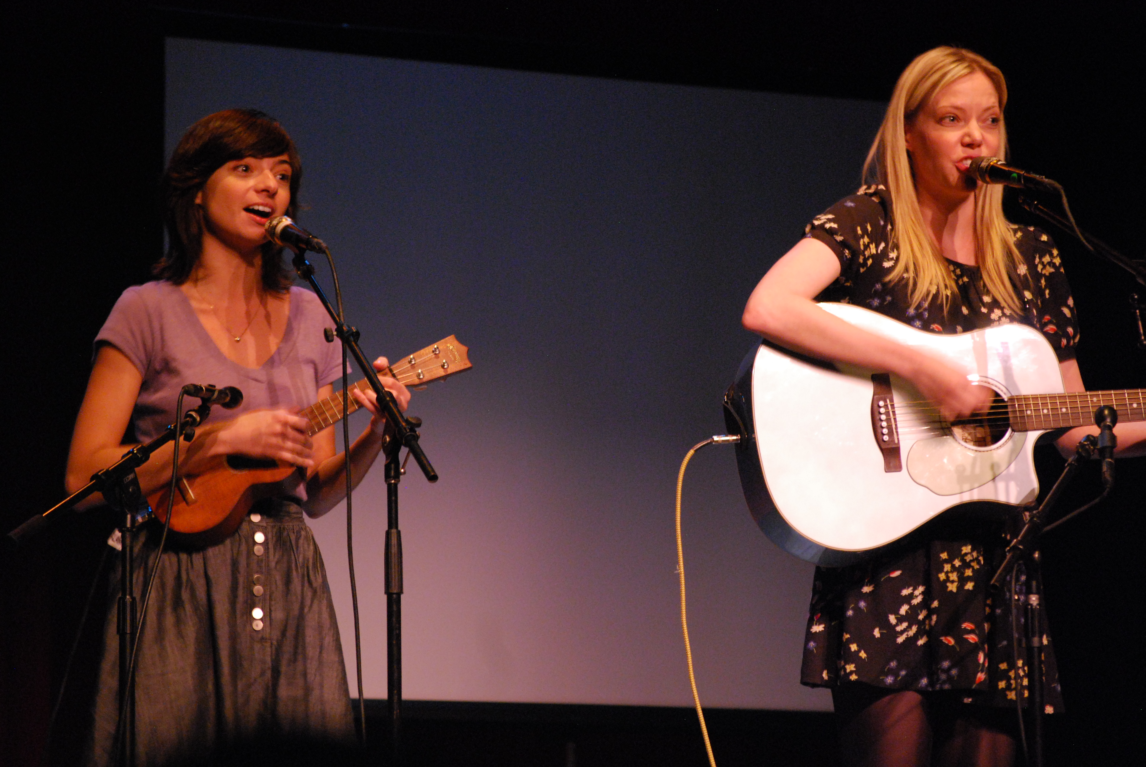 Garfunkel & Oates